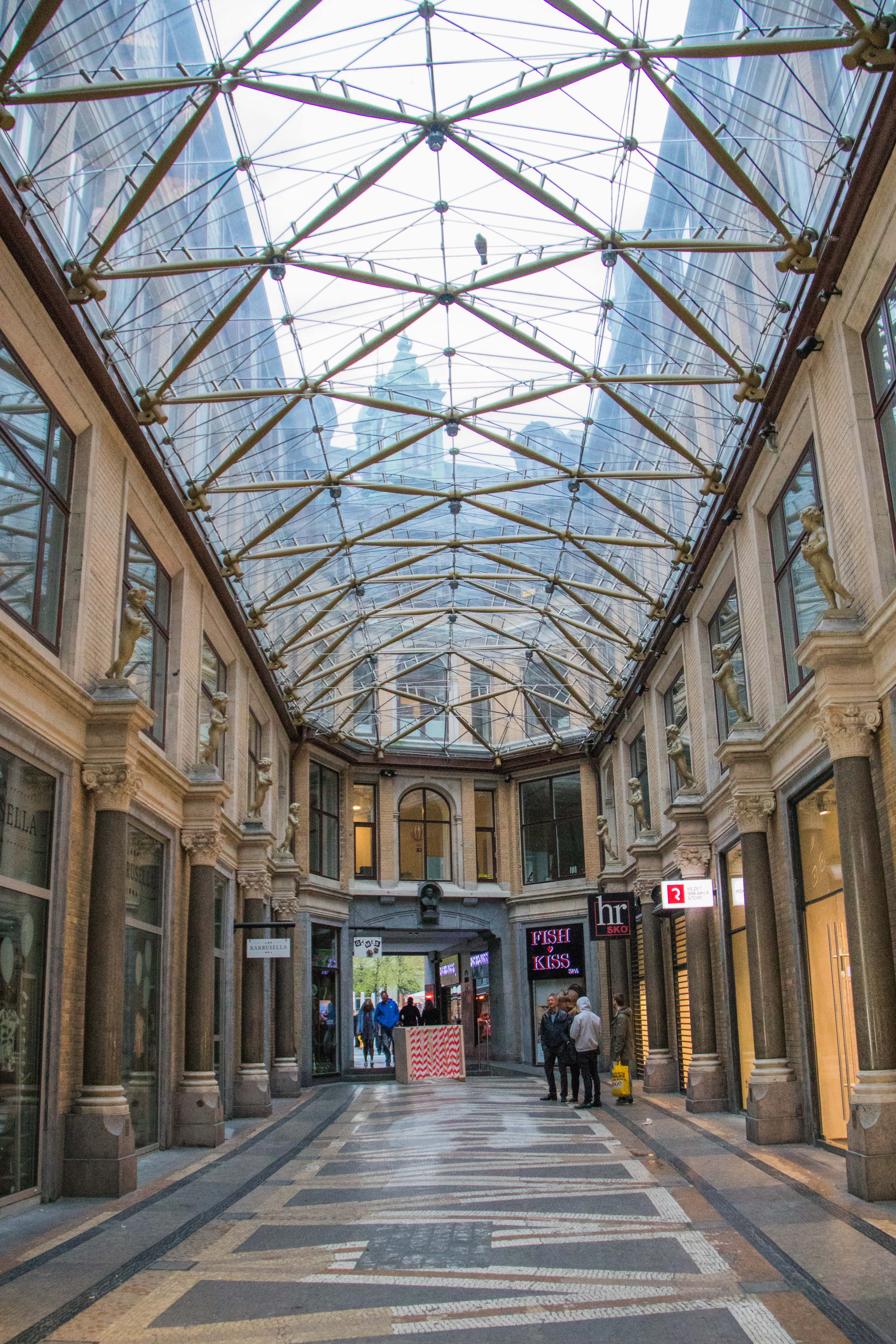 Horcks Passage in Copenhagen, Denmark